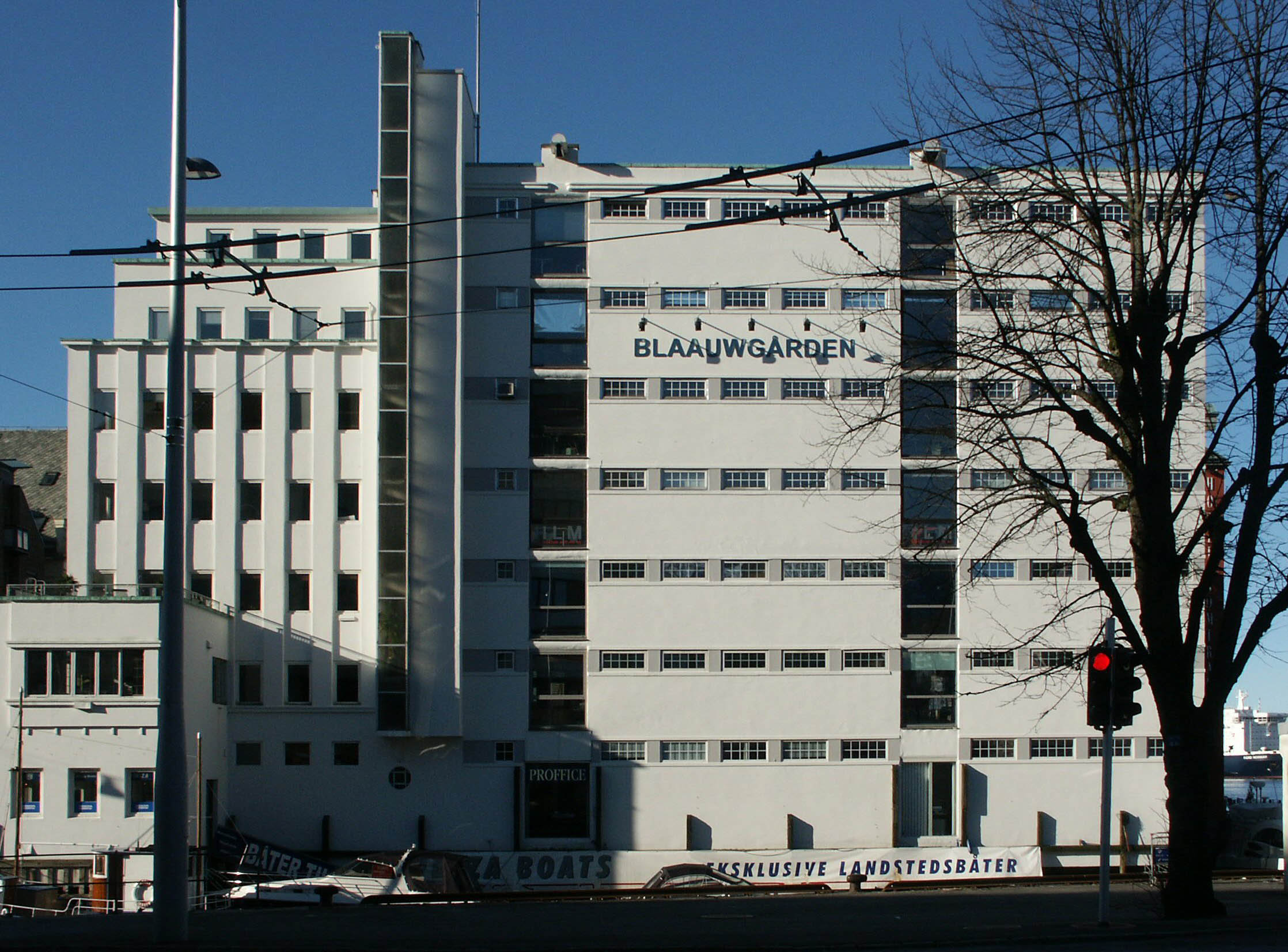 Architect Leif Grung, Blauw-gården, Bergen, Norway